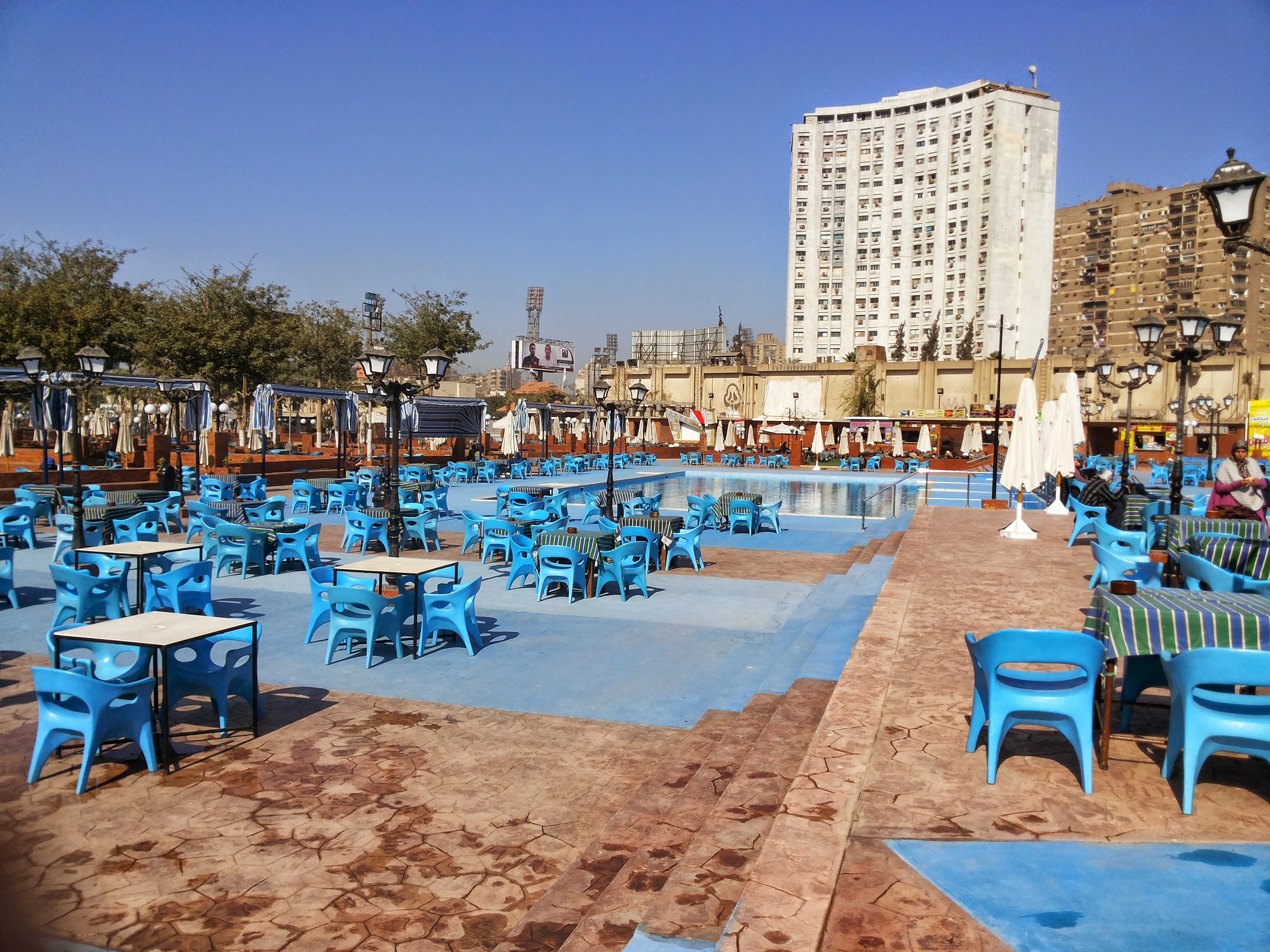 zamalek sporting club1